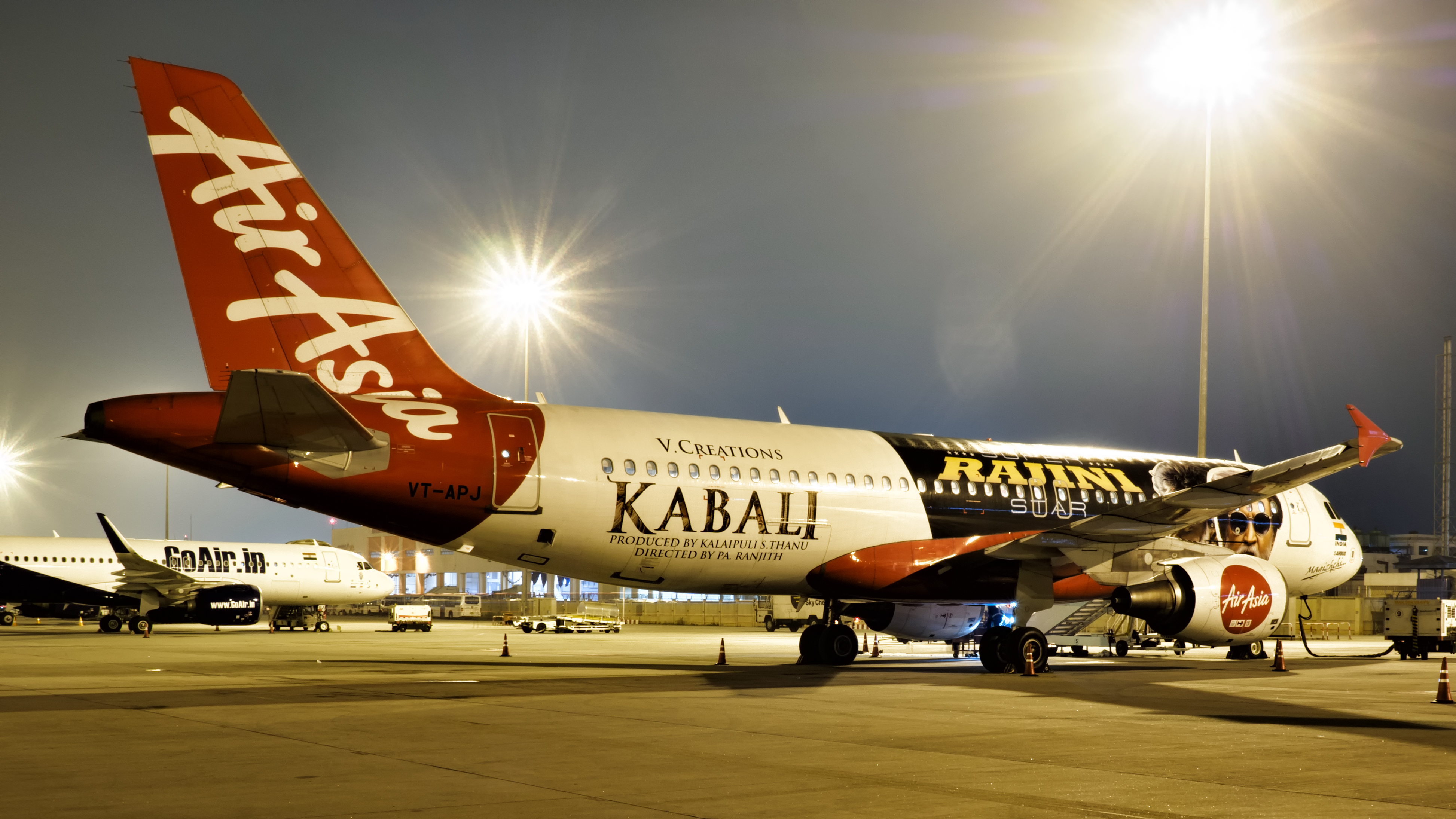 VT-APJ_VOBL_20180111